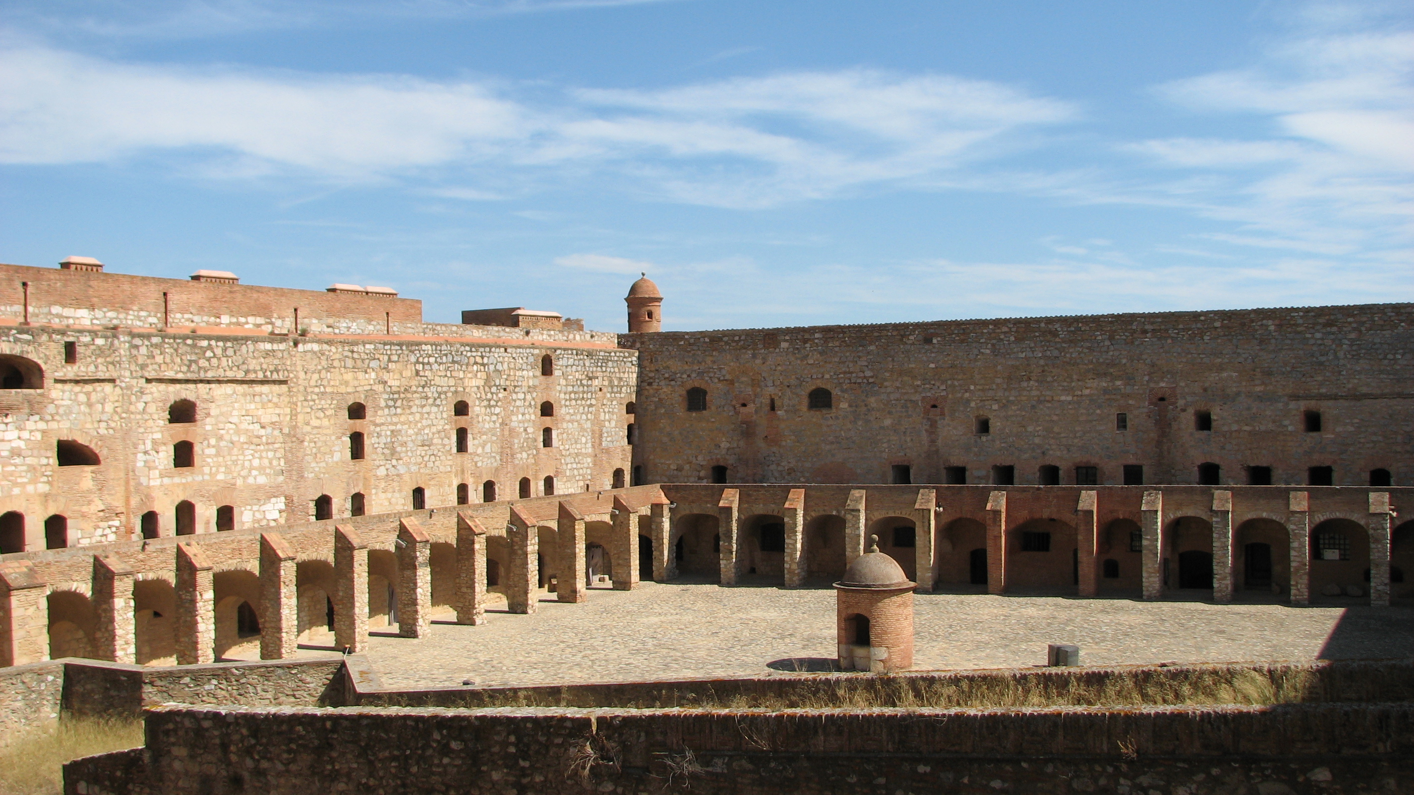 Forteresse de Salses, cour interieure, France